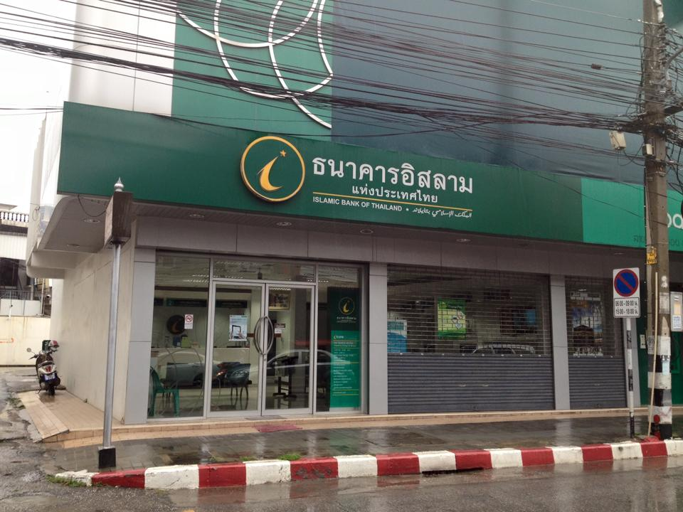 ธนาคารอิสลามแห่งประเทศไทย แห่งหนึ่งในจังหวัดเชียงใหม่